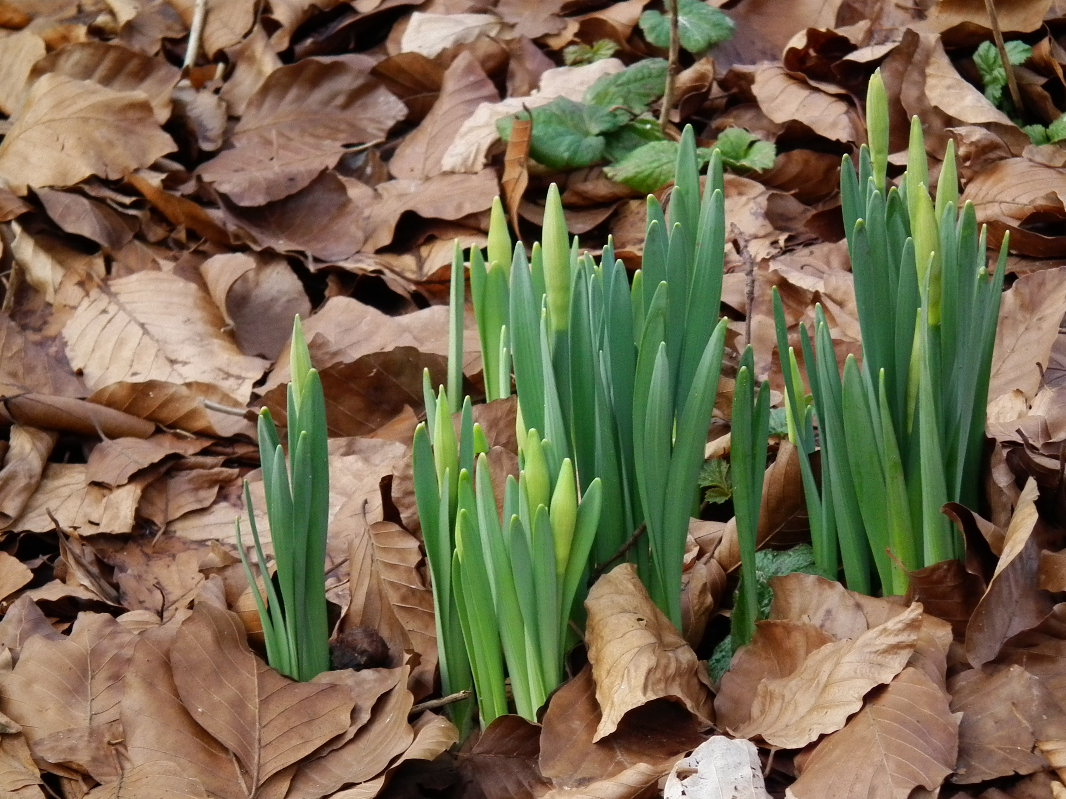 Knospen der Osterglocke (Narcissus pseudonarcissus), fotografiert in Heidelberg (Baden-Württemberg, Deutschland)